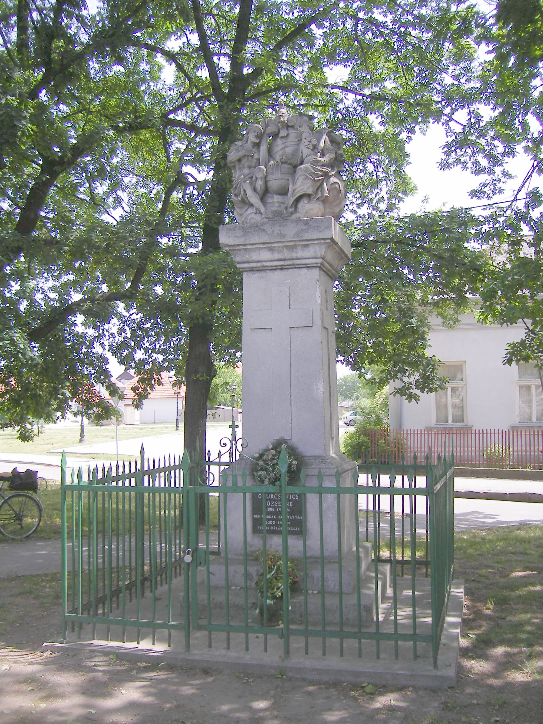 Ógyalla - Szentháromság-szobor